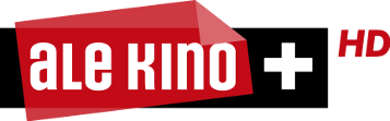 Logo kanału ale kino+ HD (2011)